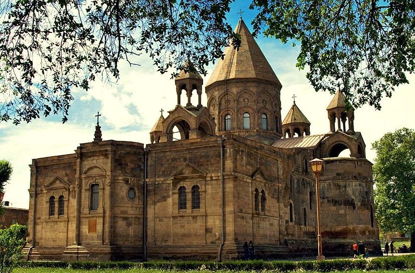 Эчмиадзинский Кафедральный Собор, Армения